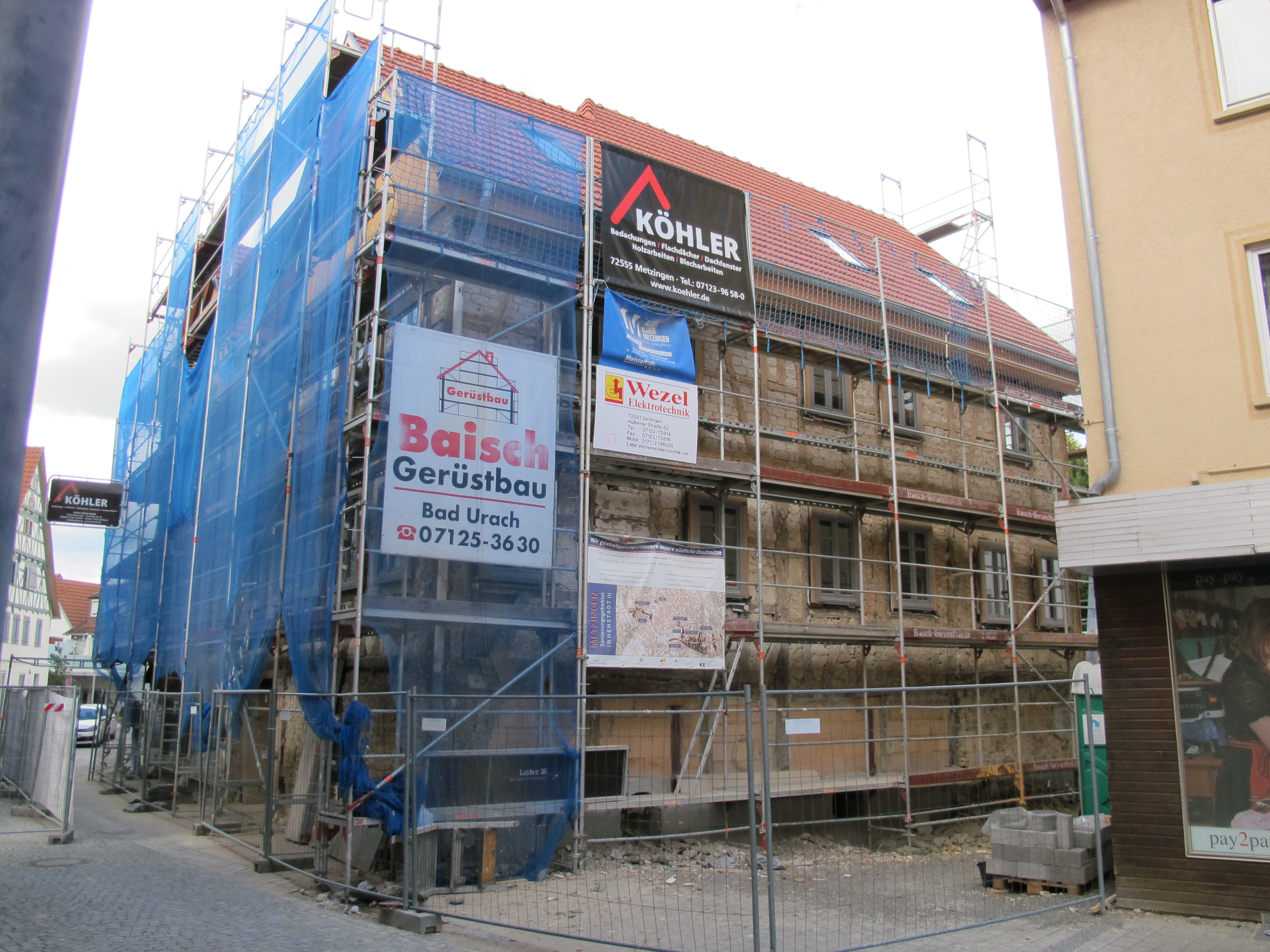 Zweigeschossiges Gebäude mit Gewölbekeller, ehem. Pfleghof des Klosters Zwiefalten. Im Kern mittelalterlicher Geschoßständerbau, 1451/1452 (d). Umfangreiche Umbauten 1930–1970. 2007 Abbruchgenehmigung des Gemeinderats, Erwerb durch Völter-Stiftung 2012 und Umbau zu einem städtischen Familienzentrum seit 2015.